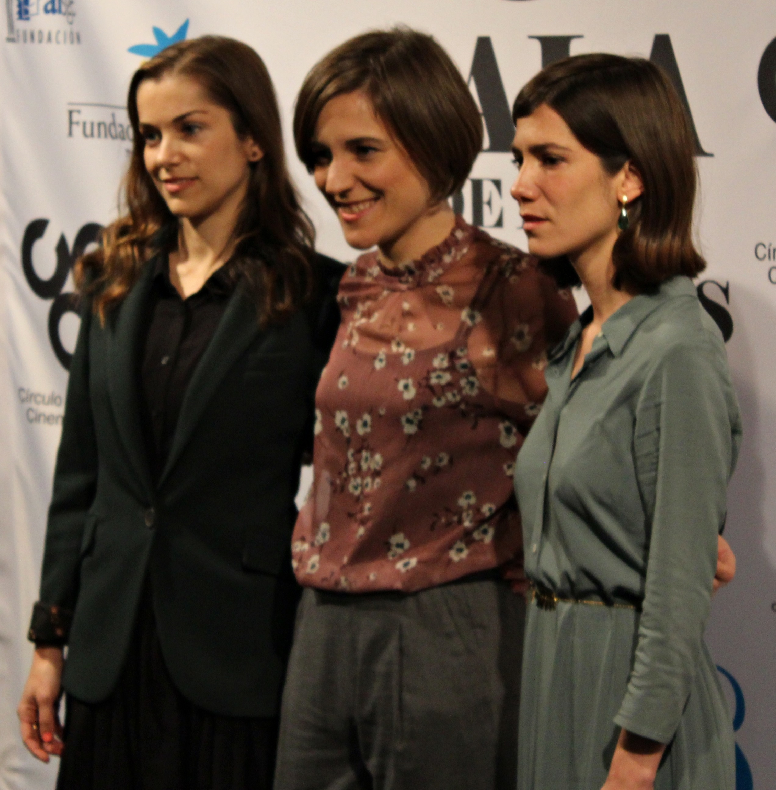 Parte del equipo de la película española Verano 1993 en la 73 edición de las Medallas del Círculo de Escritores Cinematográficos. La productora María Zamora, la directora Carla Simón y la actriz Bruna Cusí.